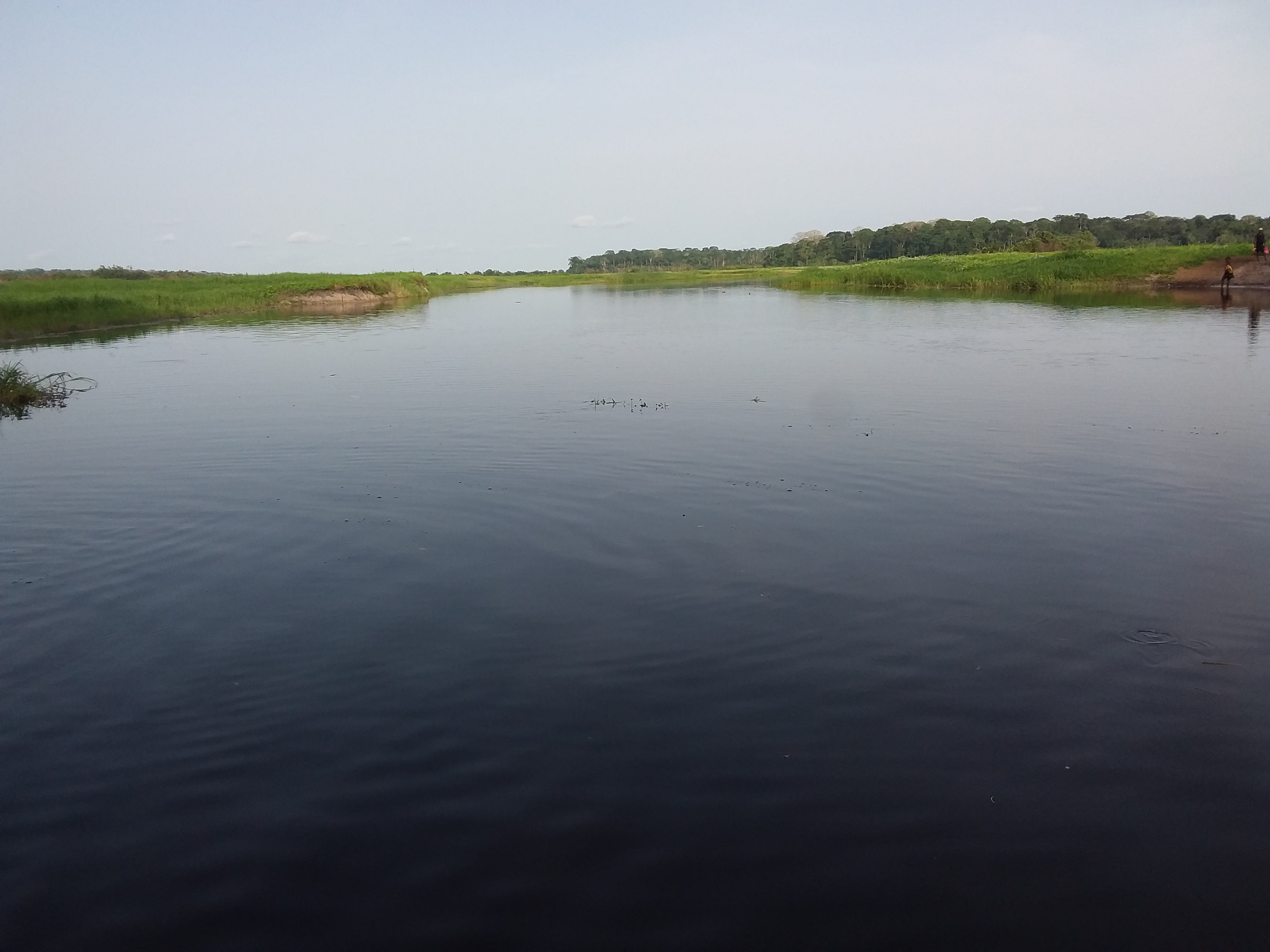 Peace of mind